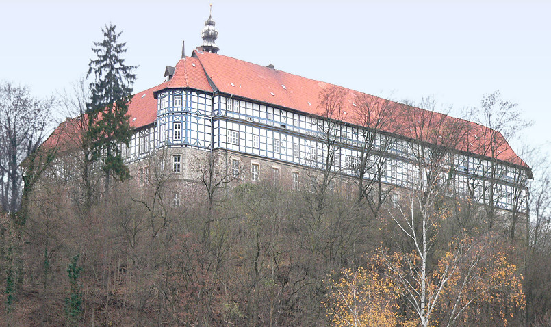 Schloss Herzberg vom Stadtzentrum aus gesehen